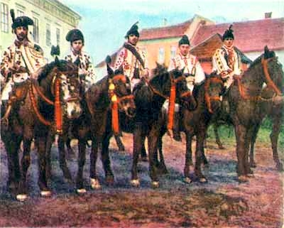 Junii Braşoveni - delegaţia la Marea Adunare Naţională de la Alba Iulia (1 Decembrie 1918)